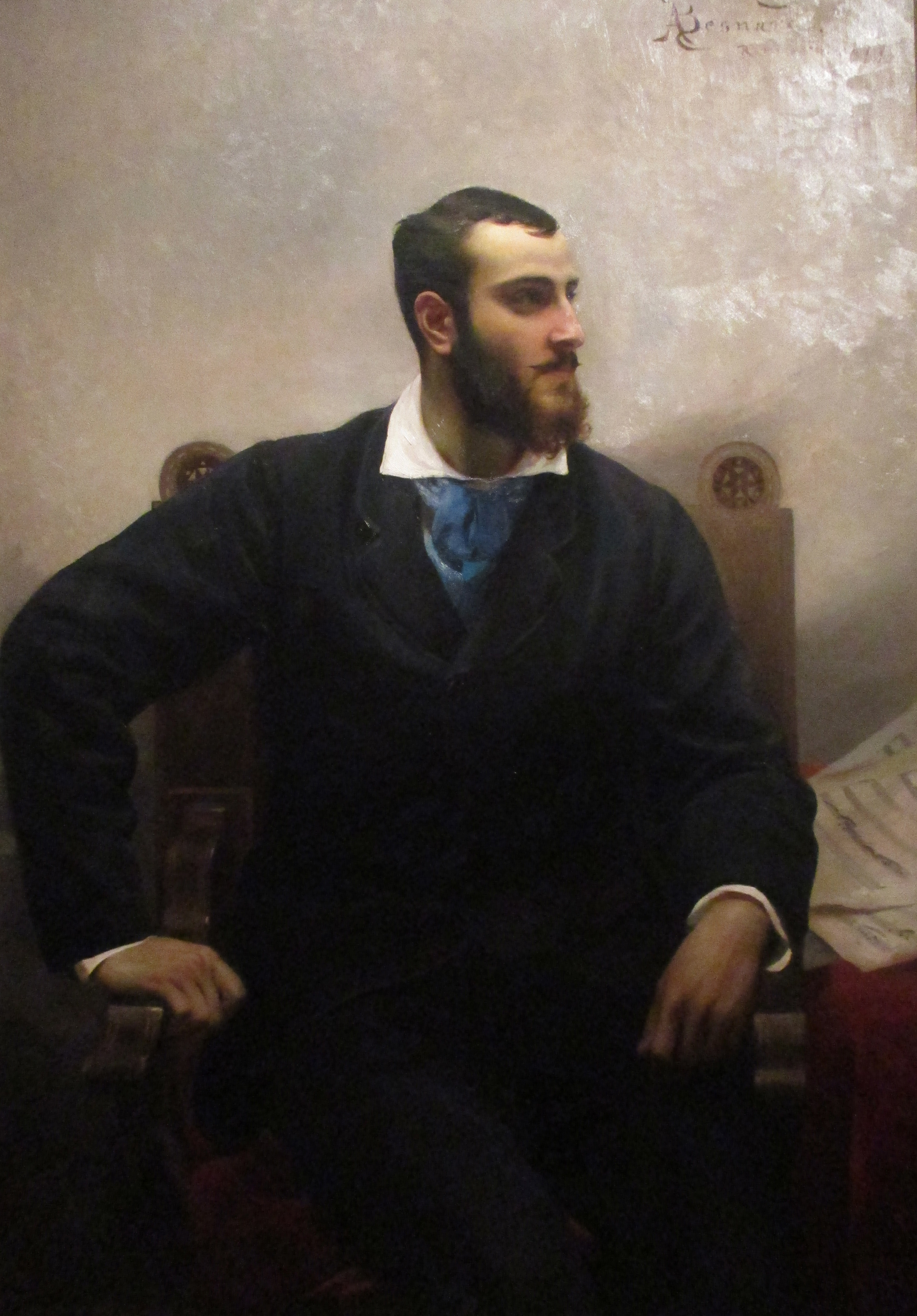 Albert Besnard, Portrait d'André Wormser (1877), huile sur toile. André Wormser, compositeur et banquier, fut le condisciple de Besnard à la Villa Médicis. Coll. Musée Carnavalet de Paris. Don de Mme Berthe Hirsch-Wormser en 1931.